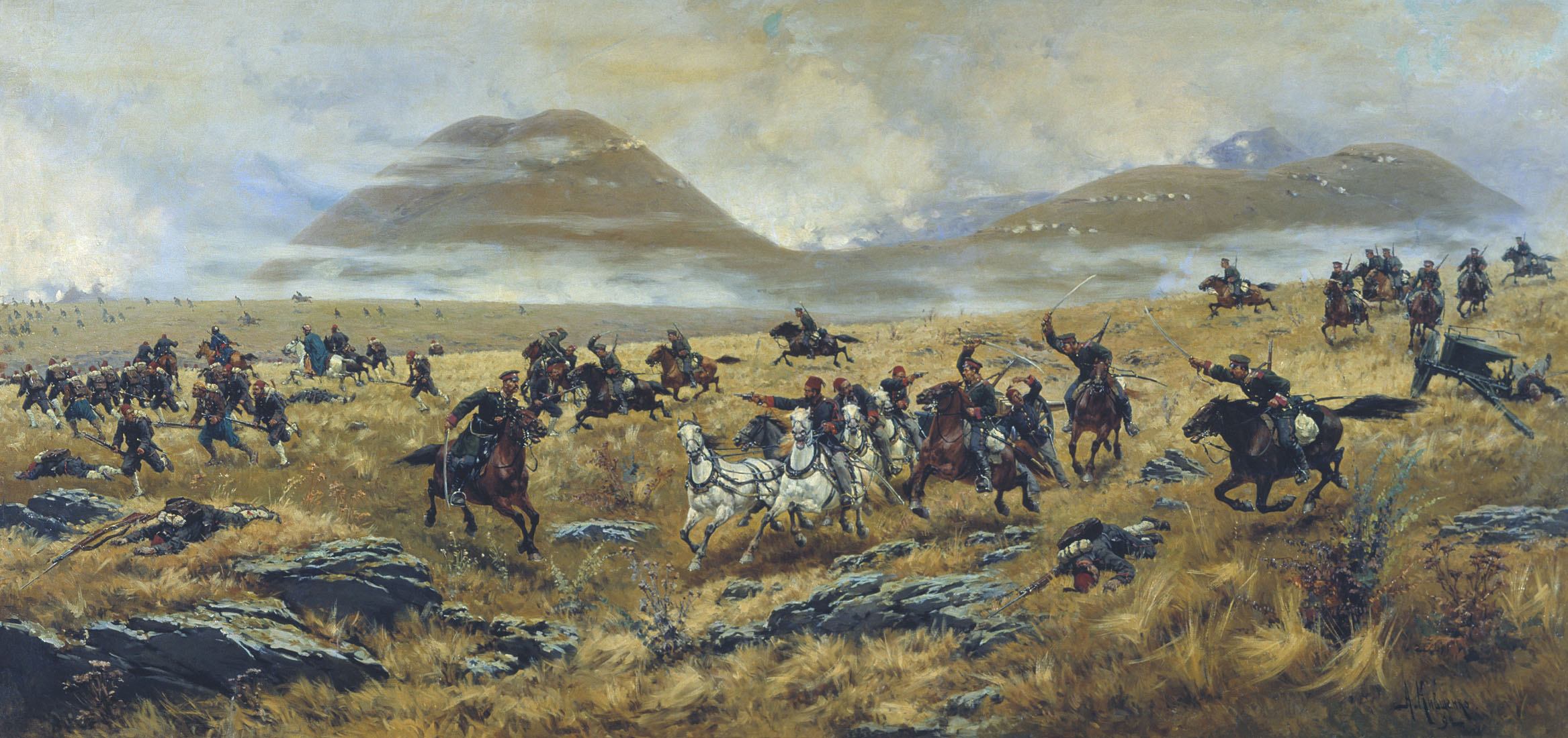 Lomas de Zavaleta